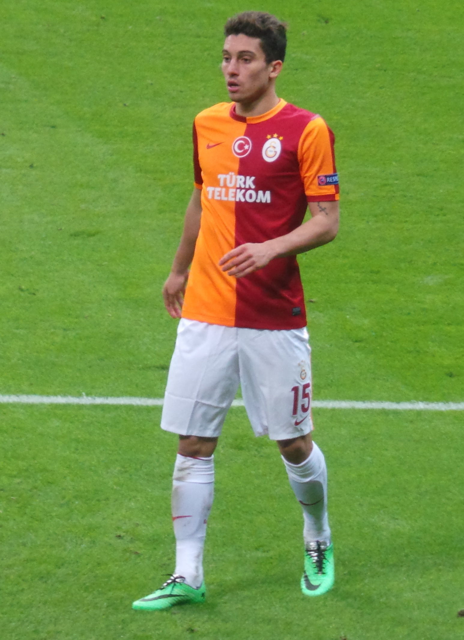 Alex Telles ilk Şampiyonlar Ligi maçı olan Chelsea maçında